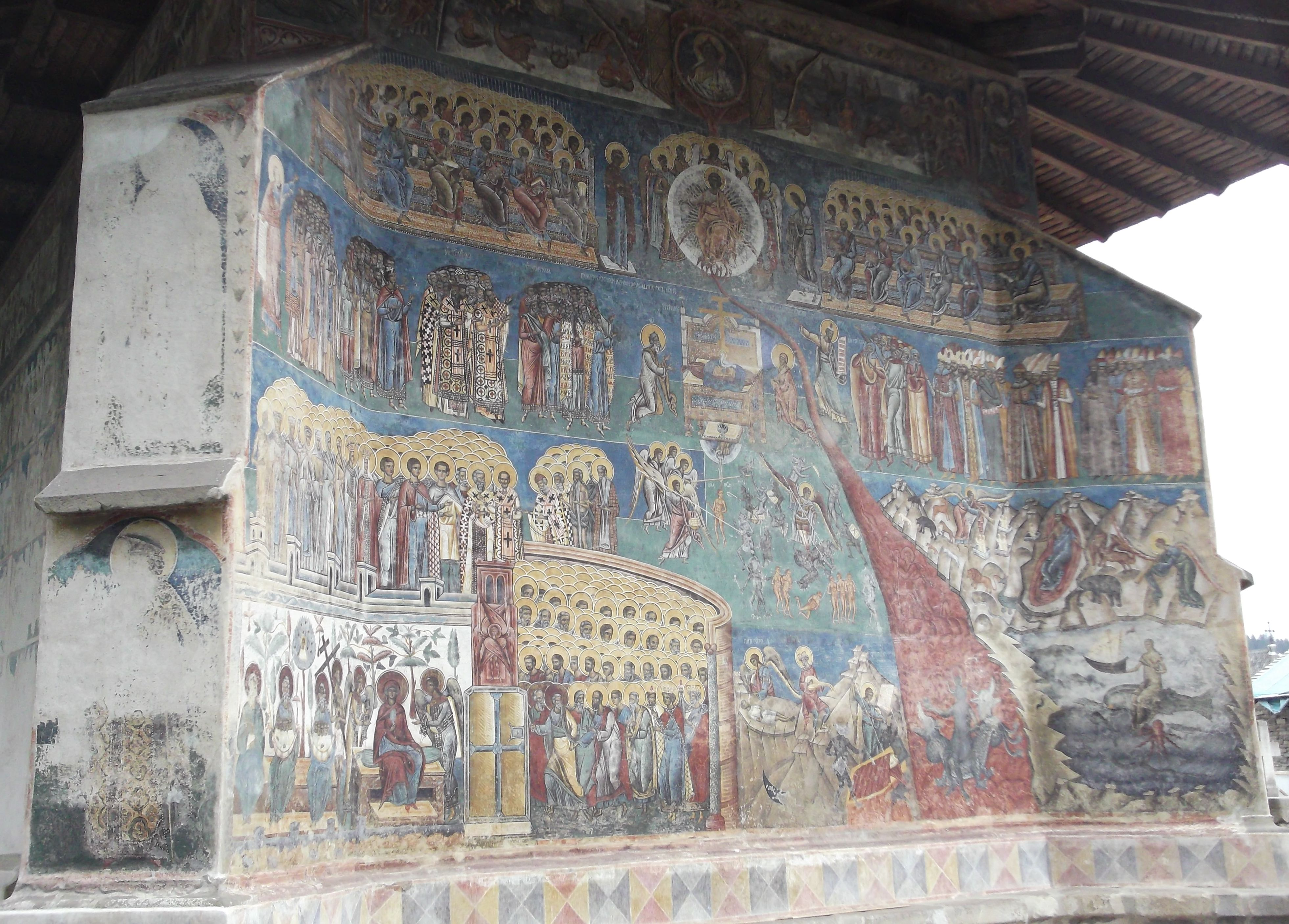 Biserica „Sfântul Gheorghe” a Mănăstirii Voroneț - detaliu exterior 01